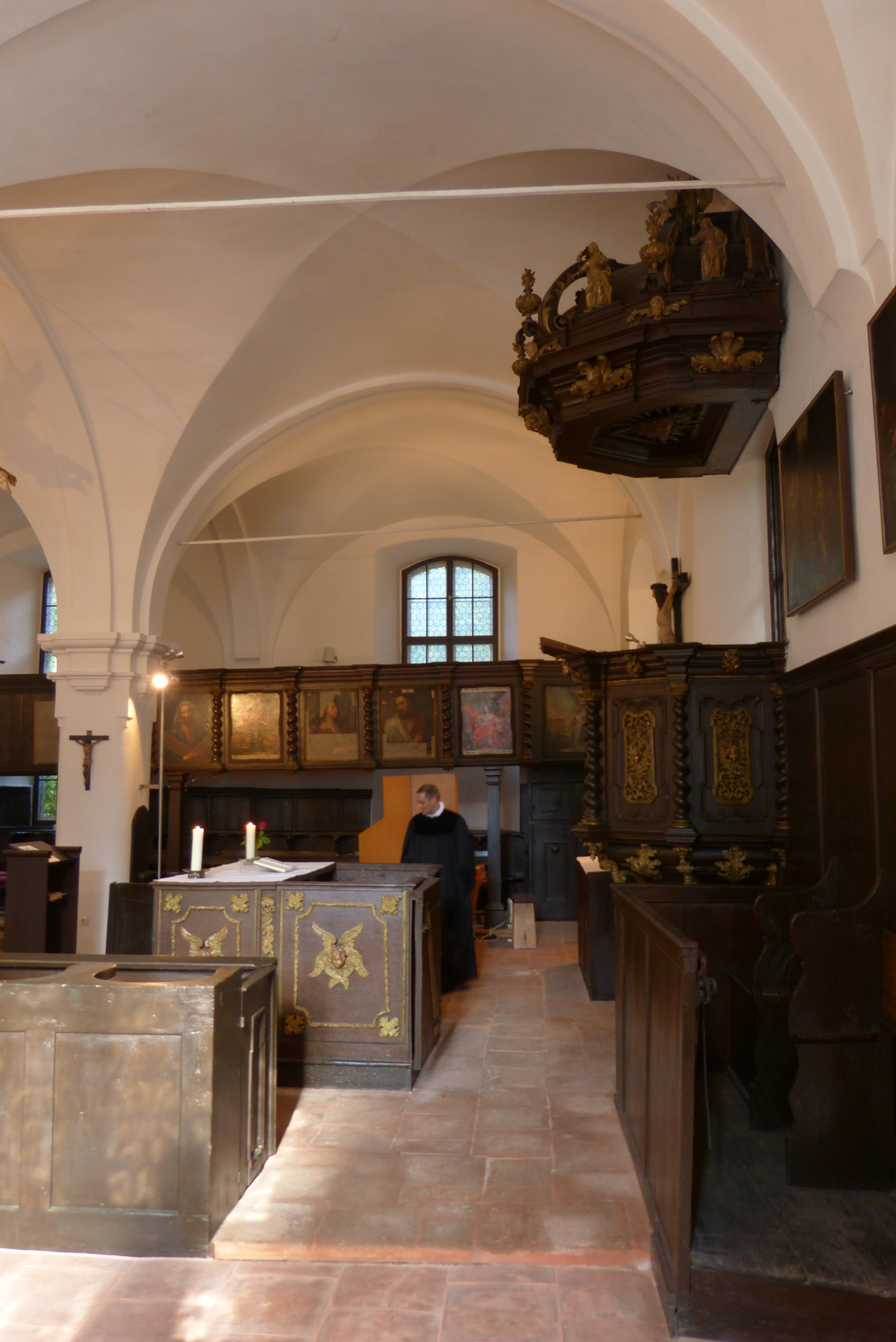 Augsburg, Heilig-Geist-Kapelle (Spitalgasse 17)This is a photograph of an architectural monument.